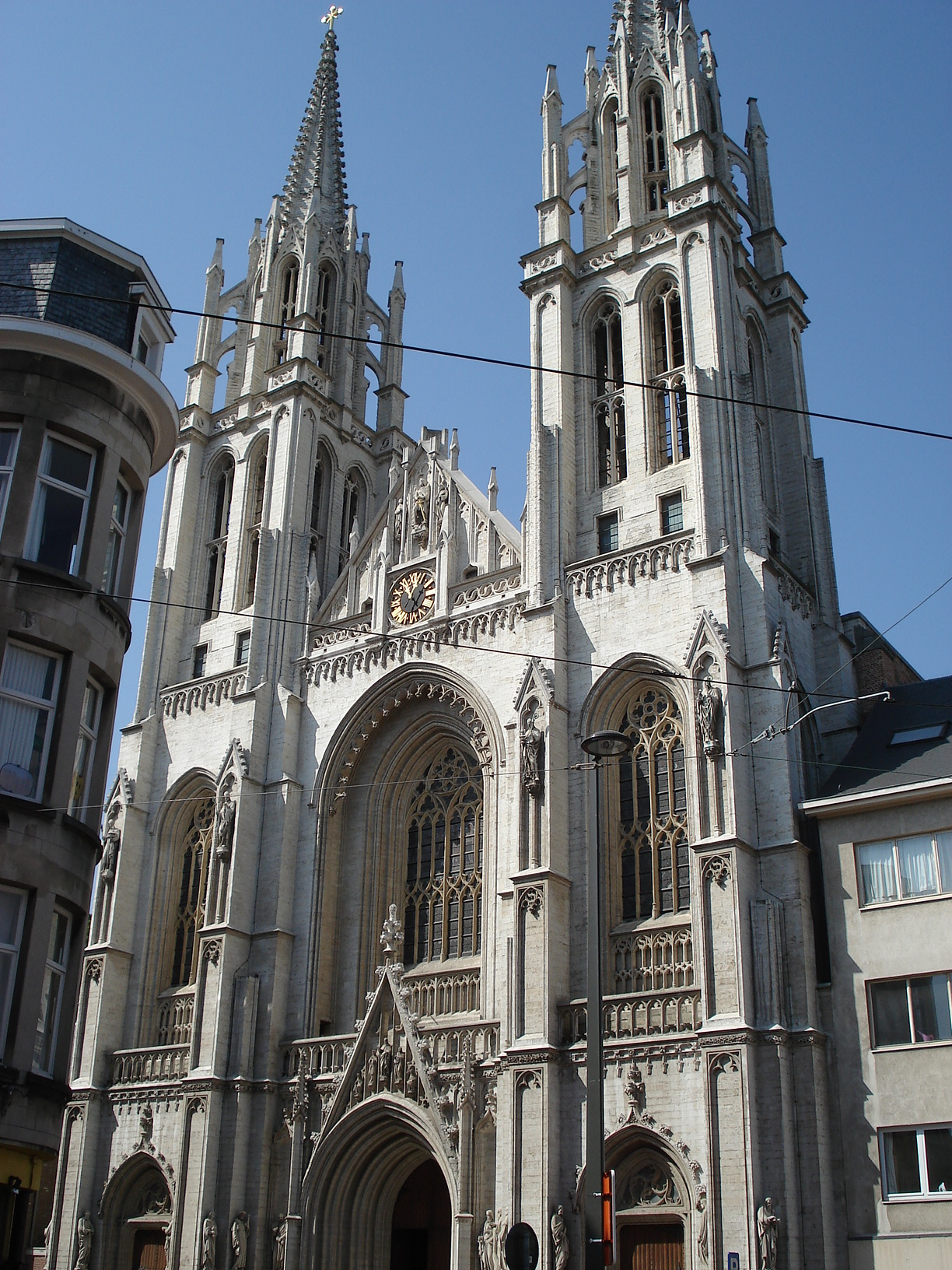 Antwerpen, Sint-Joriskerk, voorgevel.